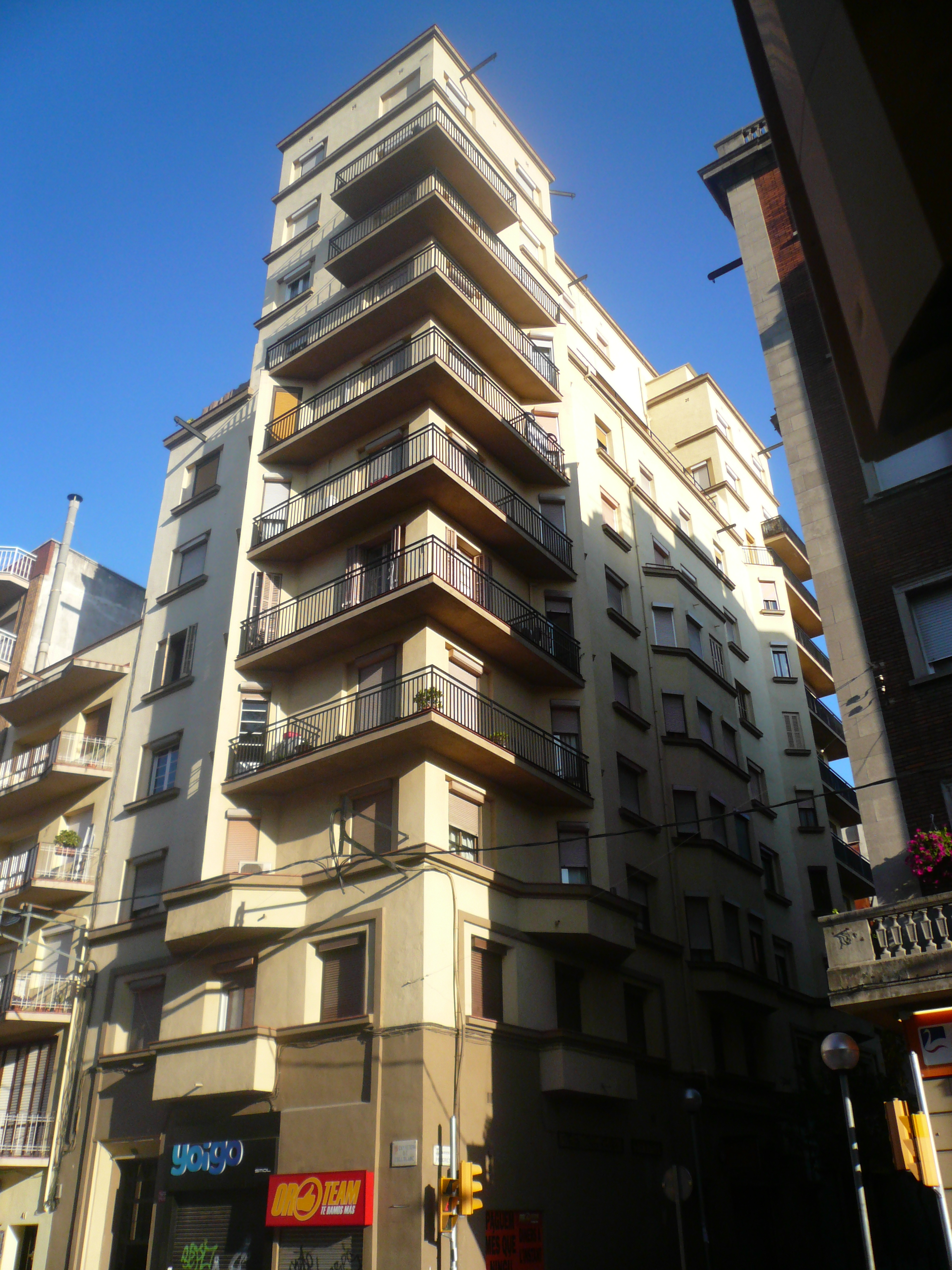 Gratacels (l'Hospitalet de Llobregat) Object location41° 22′ 32.13″ N, 2° 07′ 09.02″ E